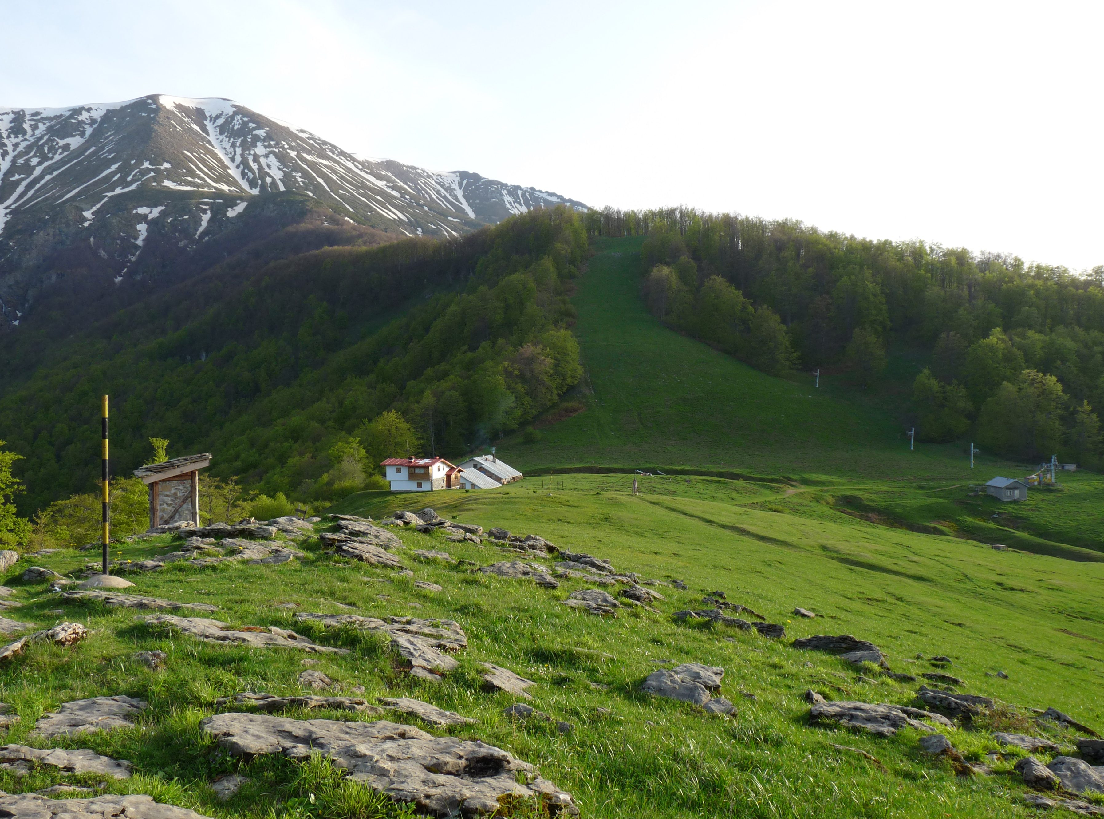 Централен Балкан, Стара планина